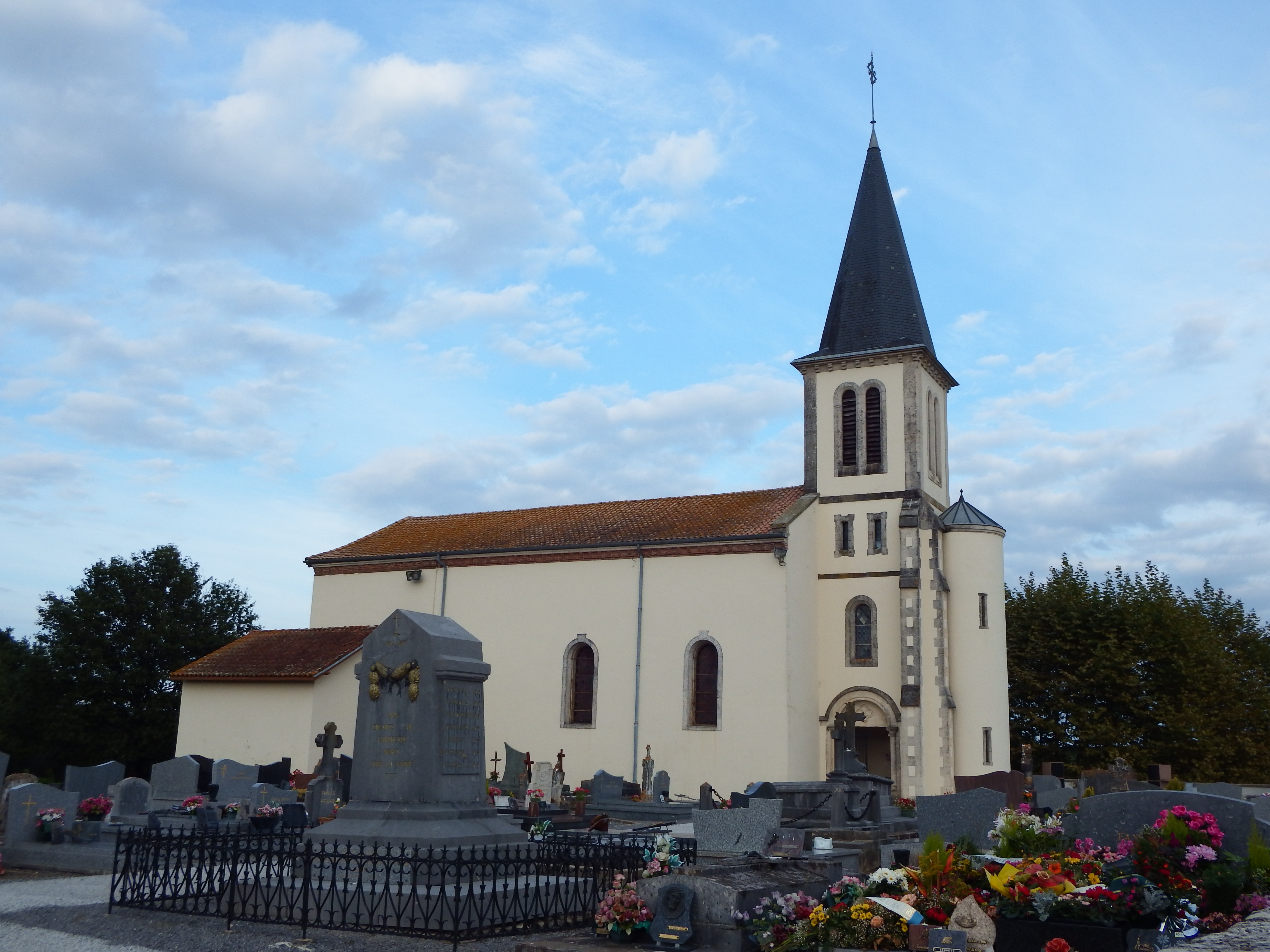 Église Sainte-Eugénie de Candresse (Landes, France)